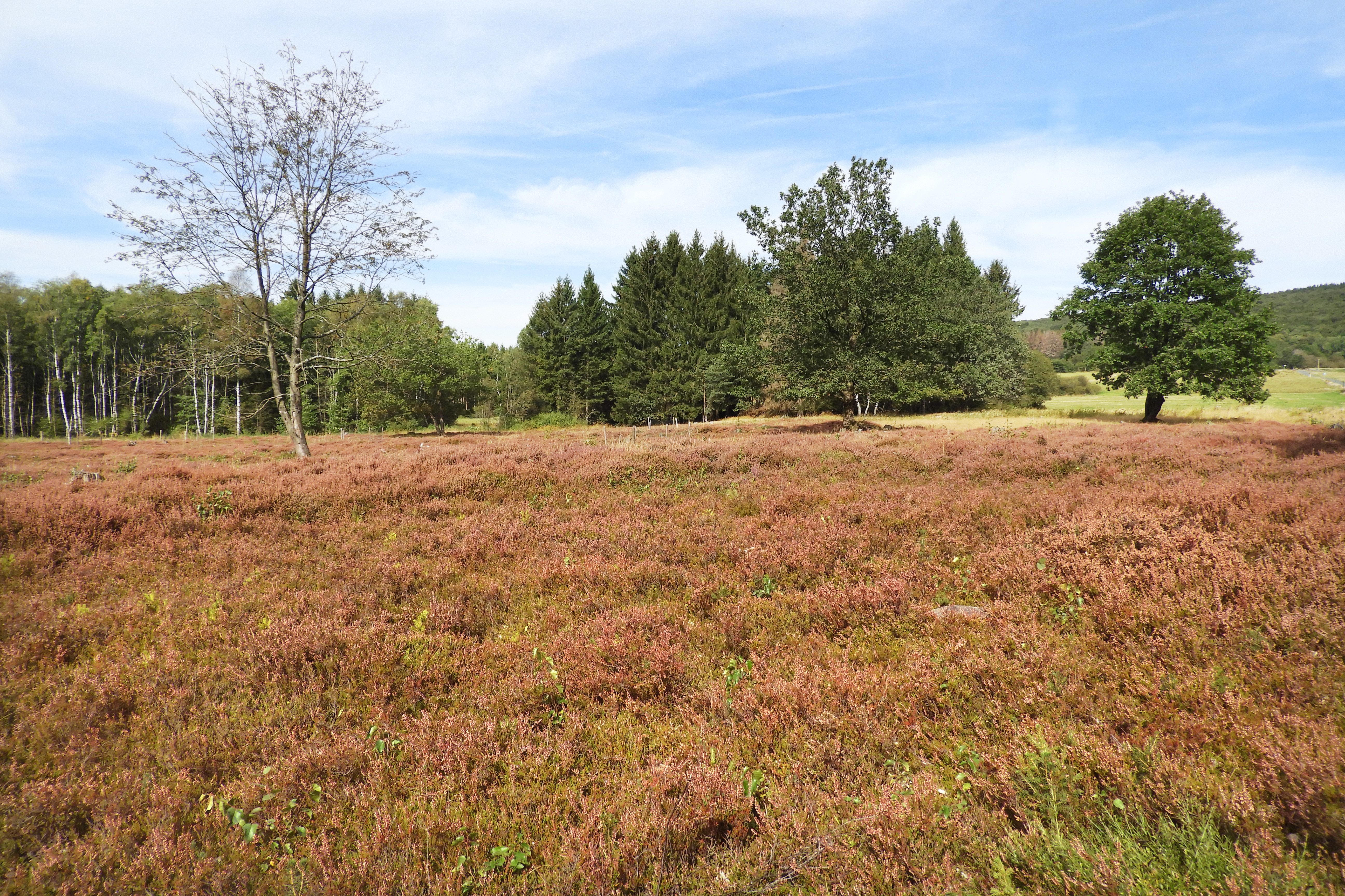 Die „Tiefenbachwiesen bei Rommerode“ sind extensiv genutzte Bergwiesen westlich des Ortes Rommerode im nordhessischen Werra-Meißner-Kreis. Die oft kleinen Parzellen wurden durch Hecken abgegrenzt und über Generationen gepflegt. Das bildete eine grenzlinienreiche Kulturlandschaft aus, deren Reste heute noch vorhanden sind. Als einen Bereich, der die Vielfalt an Lebensräumen im Grünland repräsentiert wurden Teile der Wiesen im März 1989 zum Naturschutzgebiet erklärt. Mit Erweiterungsflächen westlich und südlich des Hirschberges wurden sie unter dem Namen „Hirschberg- und Tiefenbachwiesen“ Teil des europaweiten Schutzgebietsnetzwerks „Natura 2000“.